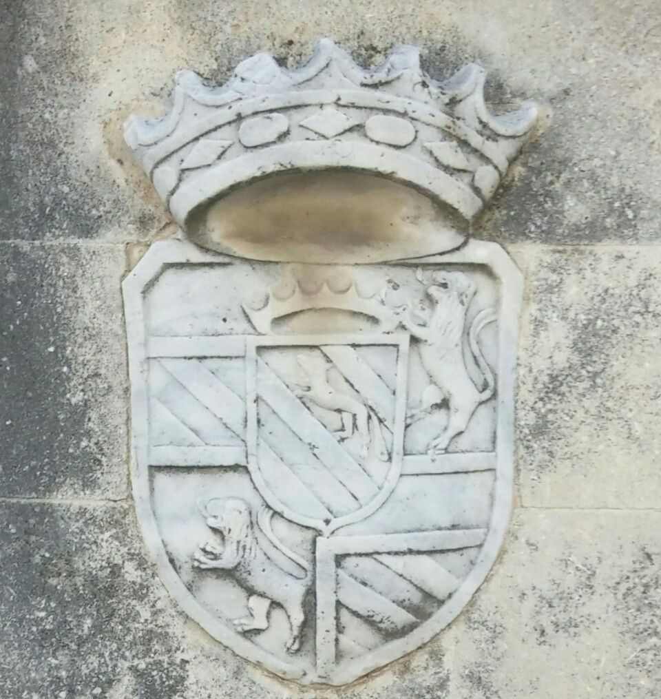 Stemma dei Caracciolo di Girifalco risalente al 1669, formato dall'unione dello scudo dei Caracciolo di Oppido con lo scudo della famiglia Ravaschieri. Palazzo Ducale di Girifalco.